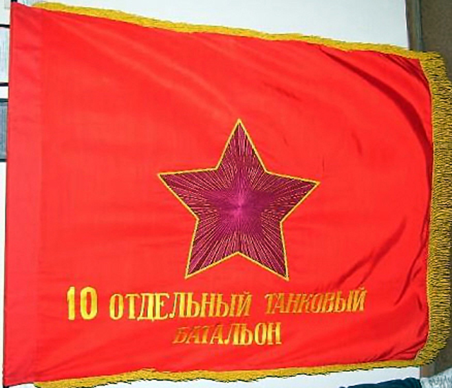 Боевое Знамя. 10-й отдельный танковый батальон